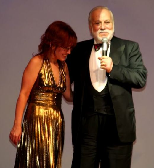 Бедрос Киркоров на юбилейном концерте Творческой Студии "Апрель"